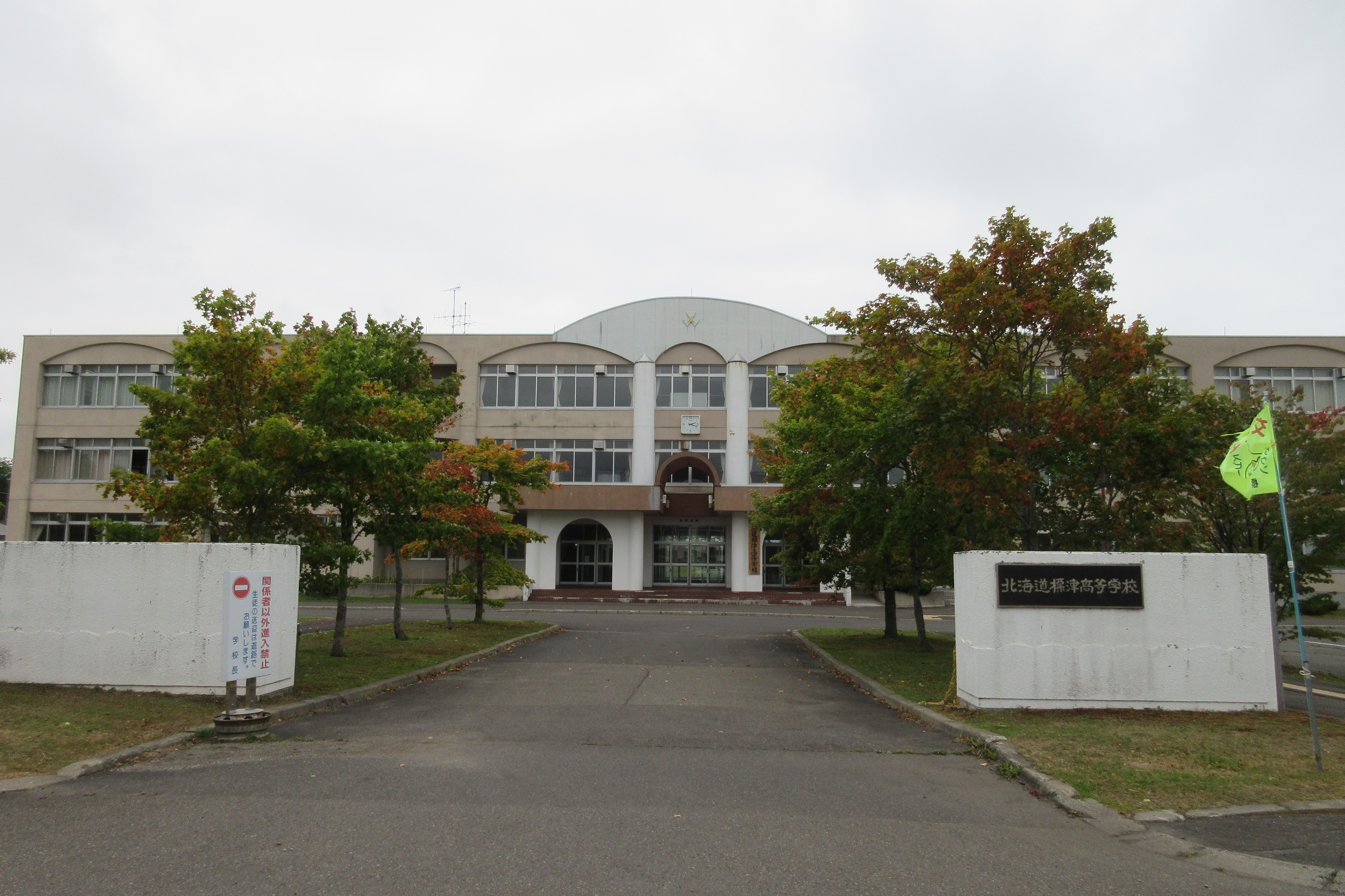 北海道標津高校